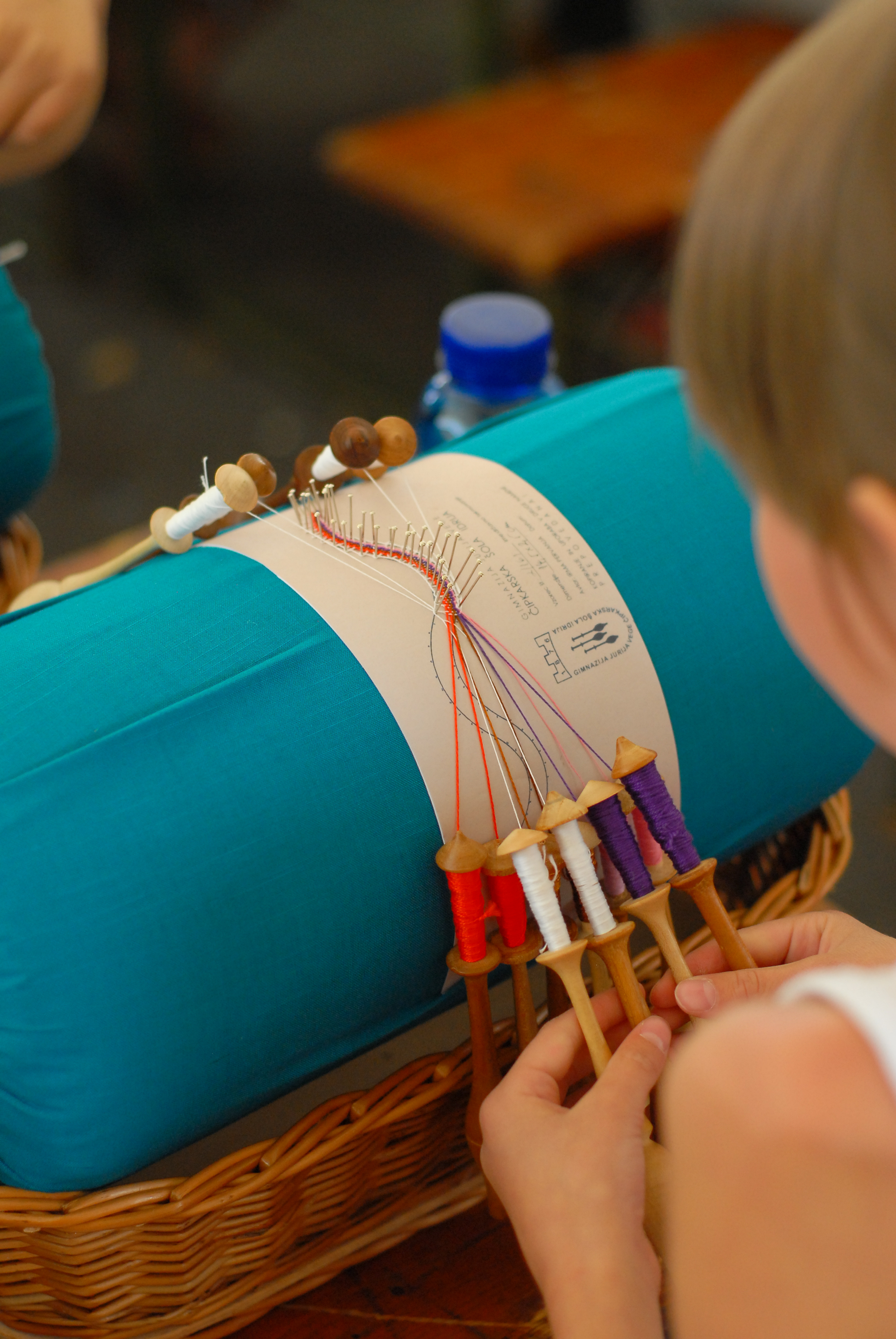 Klekljarica pri delu.